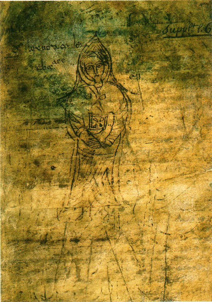 Une page de la chronique du pseudo-Frédégaire. Paris, Bibliothèque Nationale de France.